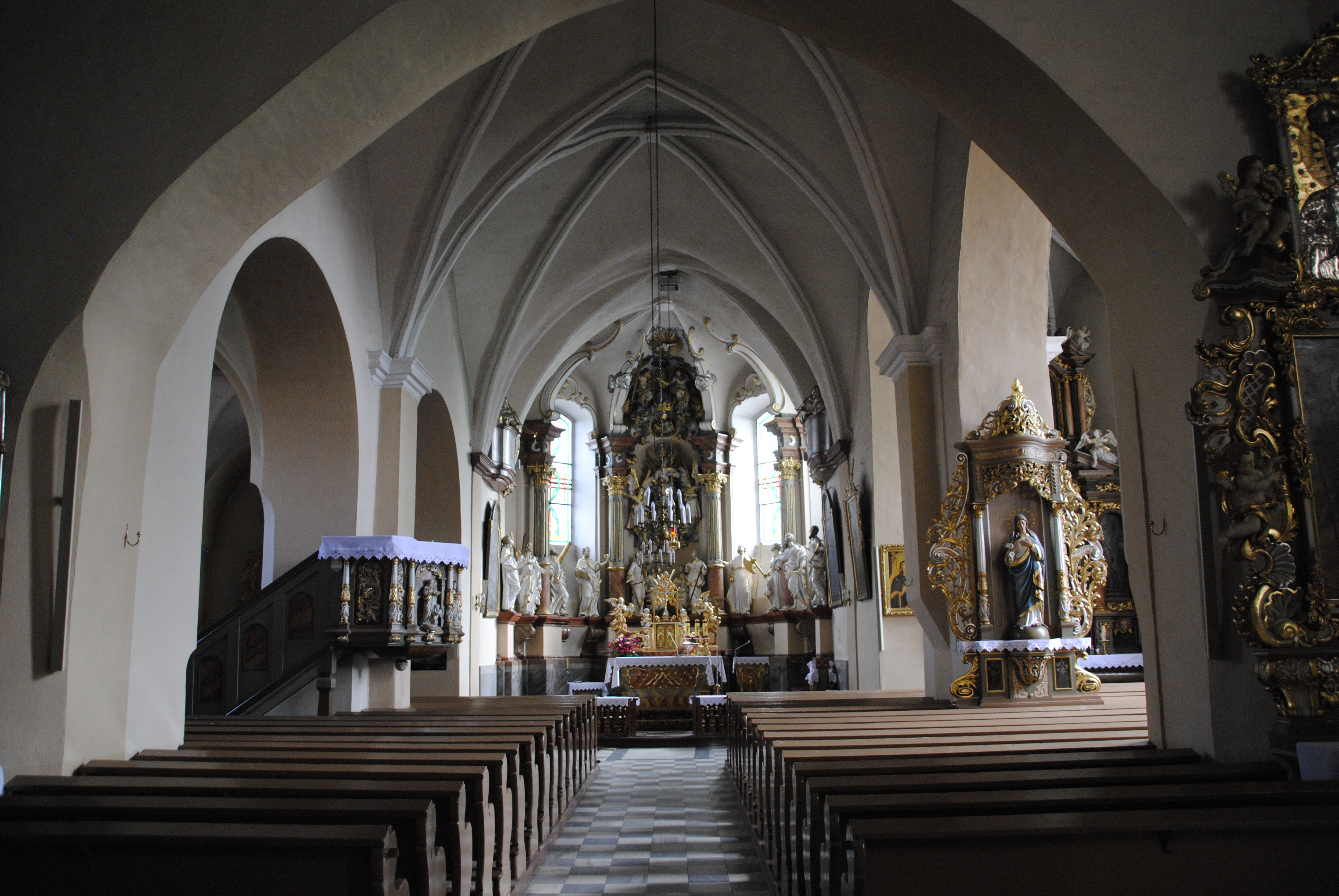 Mariä-Himmelfahrt-Kirche in Zülz (Oberschlesien)